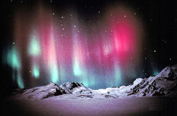 Aurora Borealis